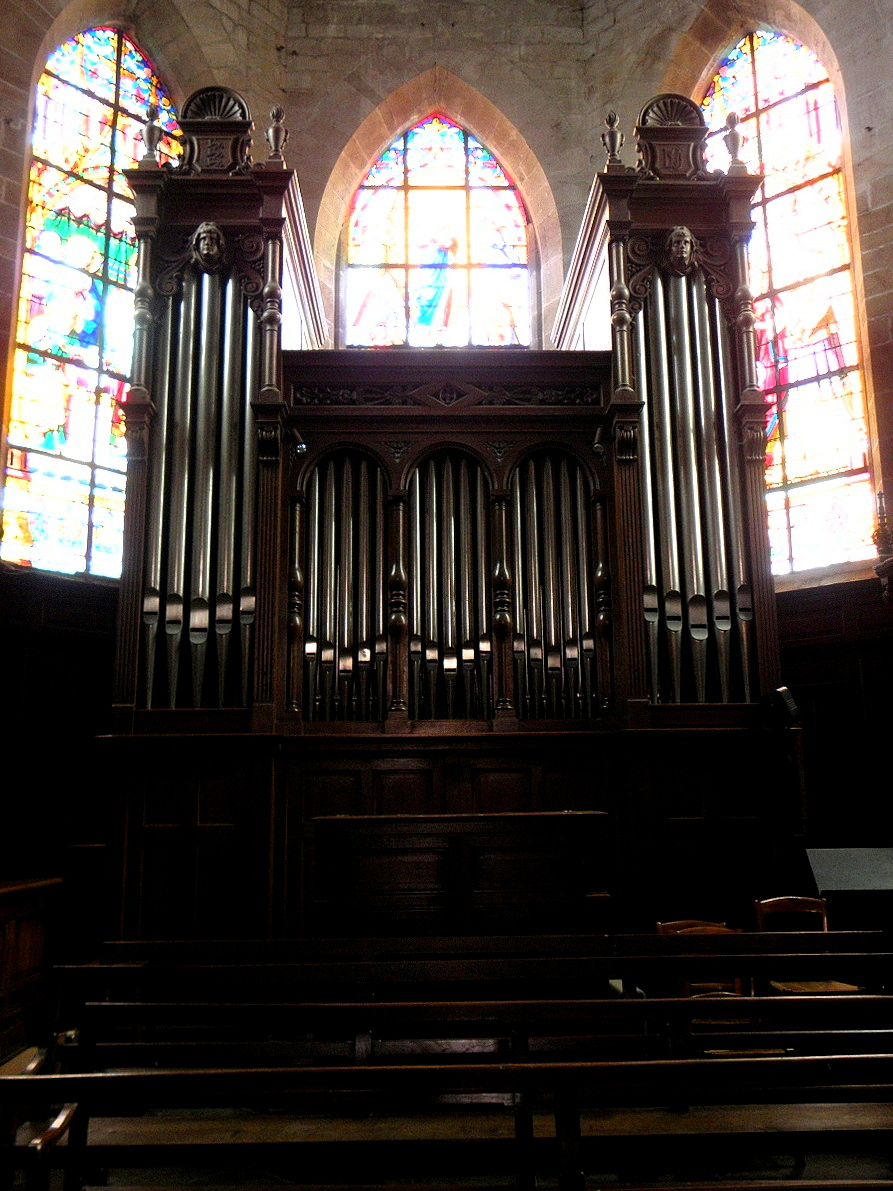 Grandes-Orgues de la Basilique Notre-Dame de La Guerche-de-Bretagne (35).